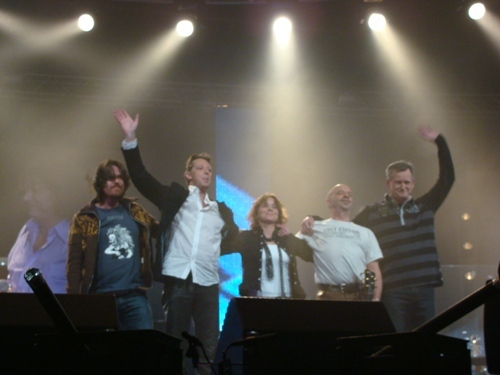 Bricquebec afscheidsconcert WTC Leeuwarden nov 28 2008